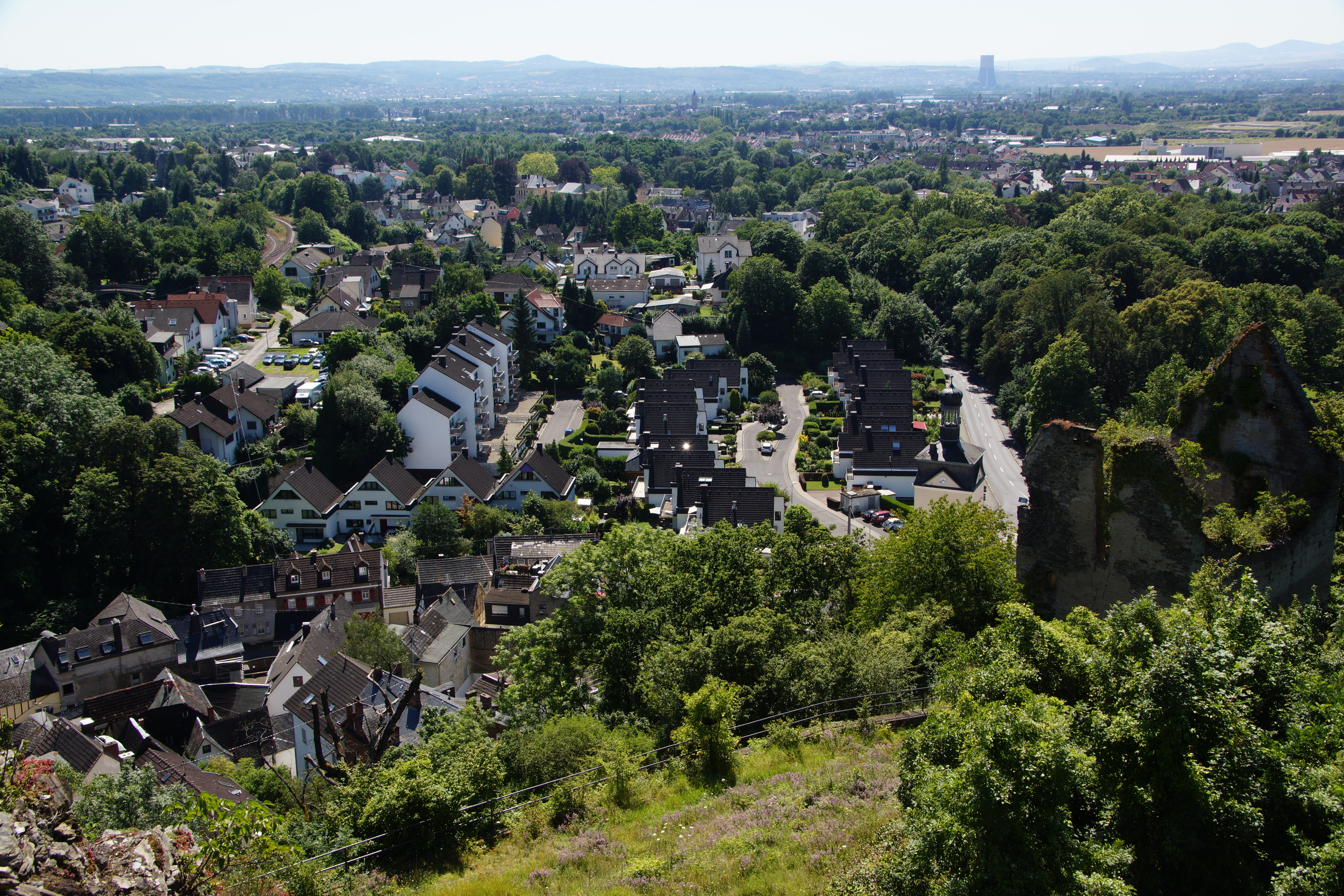 Burg Sayn in Bendorf